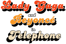 Logo de "Telephone", creado por User:El Javo y subido por mí